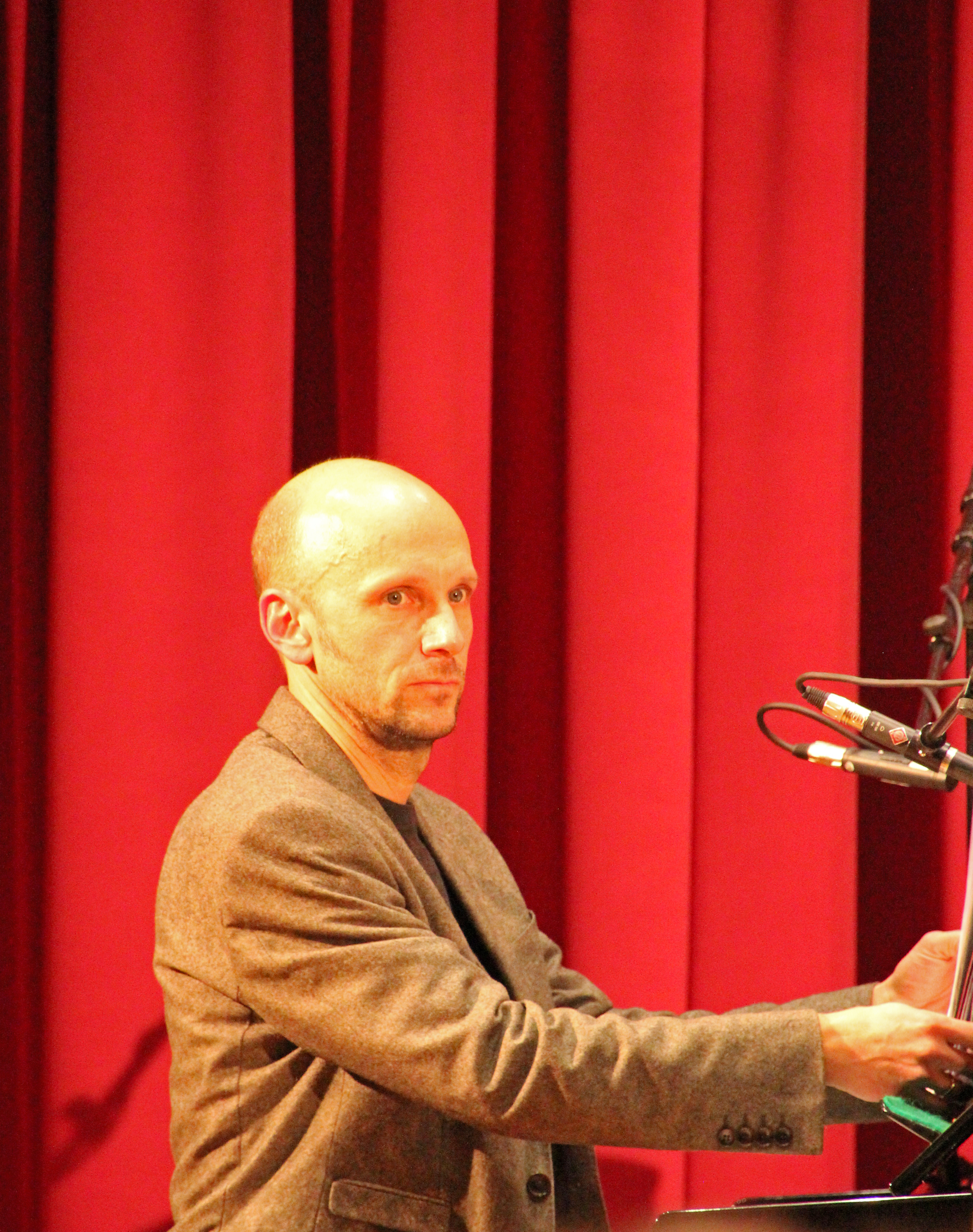 Bildinhalt: "Swing tanzen verboten". Gesprächskonzert mit Emil Mangelsdorff und seinem Quartett in der Stadtbibliothek Hanau. Emil Mangelsdorff - Altsaxophon, Uli Partheil - Piano, Jean-Philippe Walde - Bass, Janusz Stefanski - Drums Aufnahmeort: Hanau, Deutschland